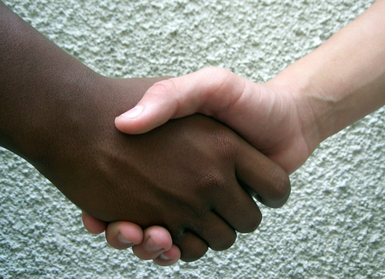 Best Viewed Large esta foto es el ícono del Grupo Babel: foto por Rufino Uribe